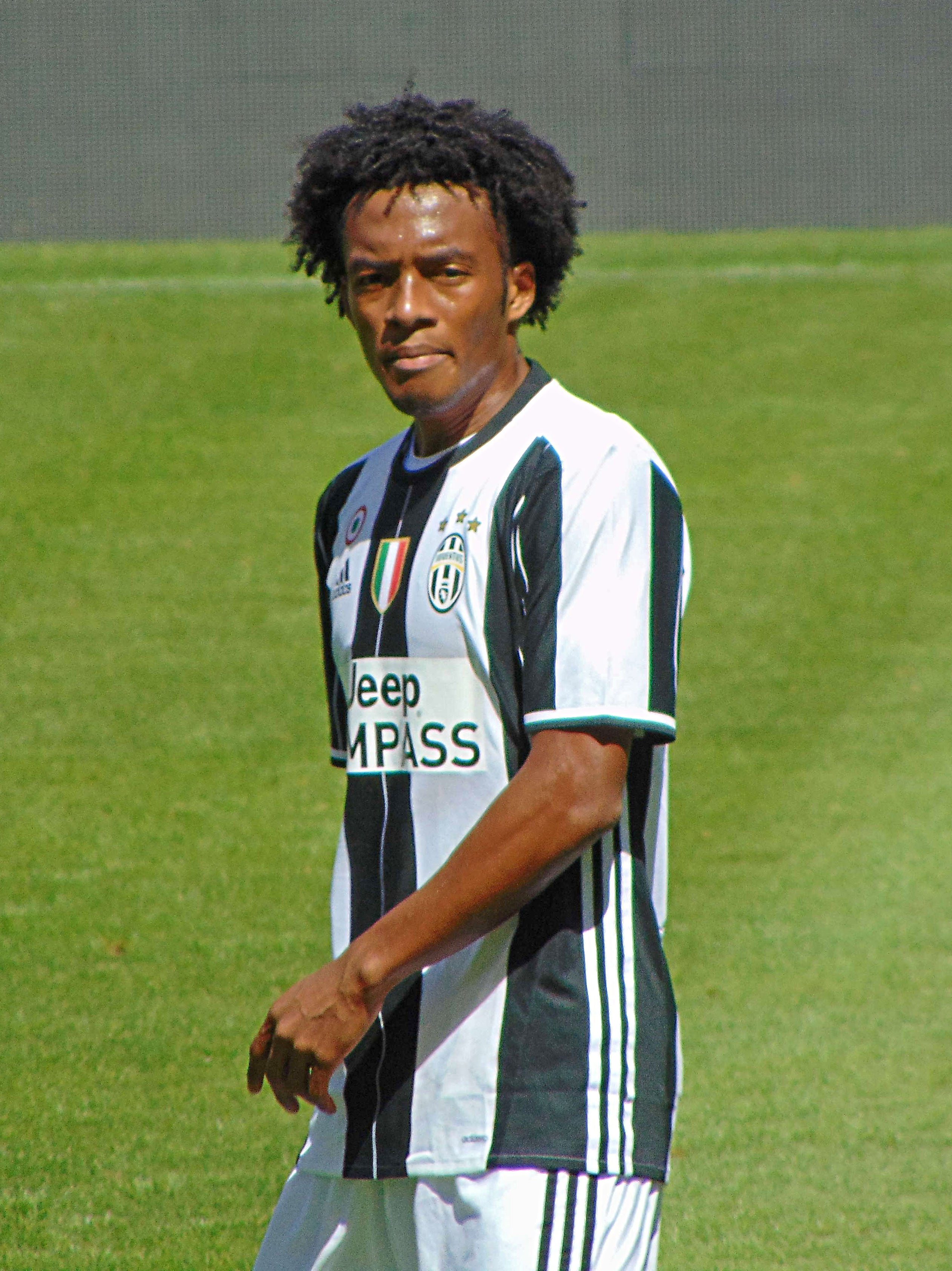 Torino, Juventus Stadium, 21 maggio 2017. Il calciatore della Juventus, Juan Cuadrado, nel corso della vittoriosa sfida interna contro il Crotone (3-0) valevole per la 37ª giornata del campionato italiano di Serie A 2016-17.